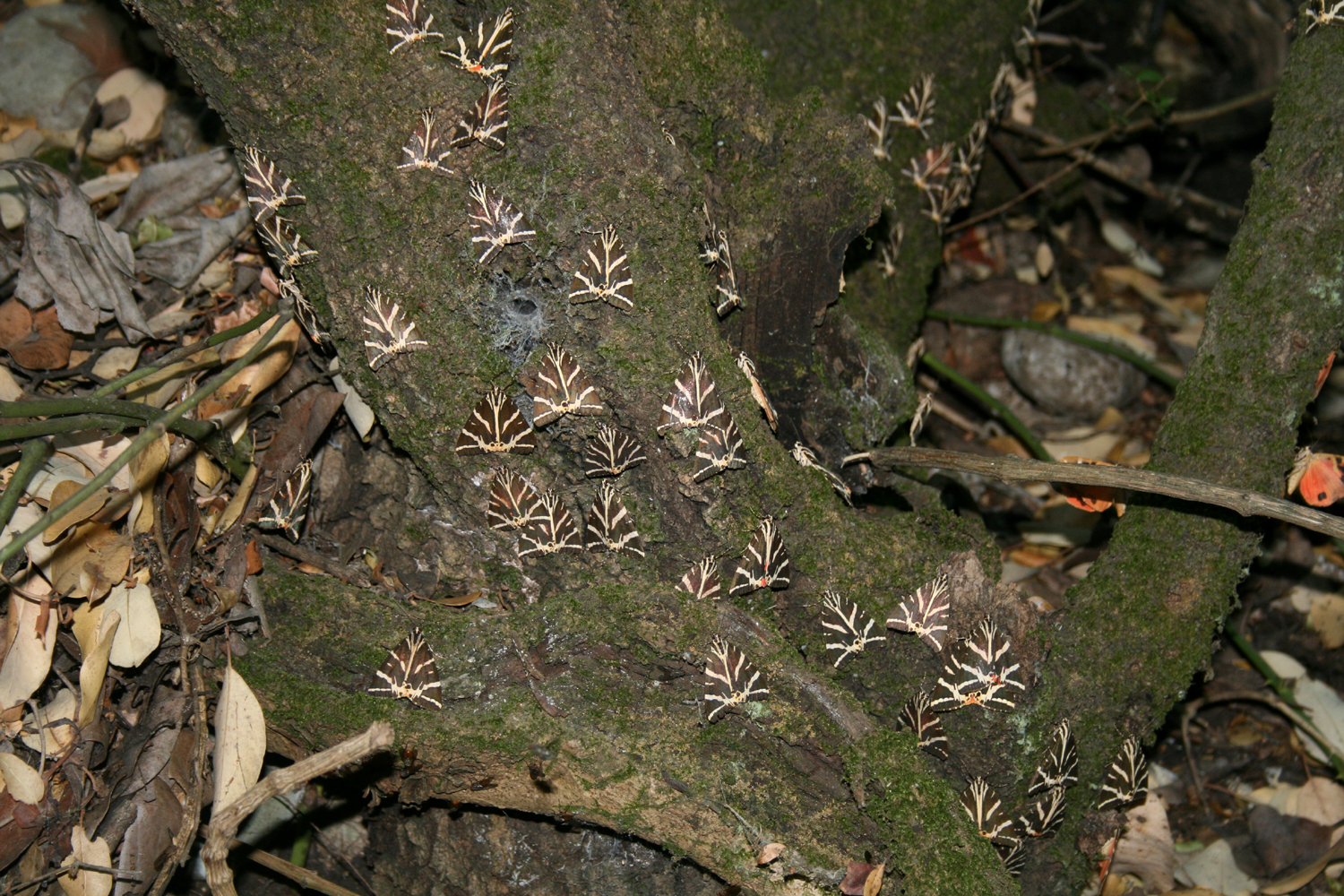 Butterflies Euplagia quadripunctaria, Rhodes island, Petaloudes, Valley of Butteflies Motýly přástevníci kostivaloví, ostrov Rhodos, Údolí motýlů, Petaloudes Date=August 2007 Author= Karelj